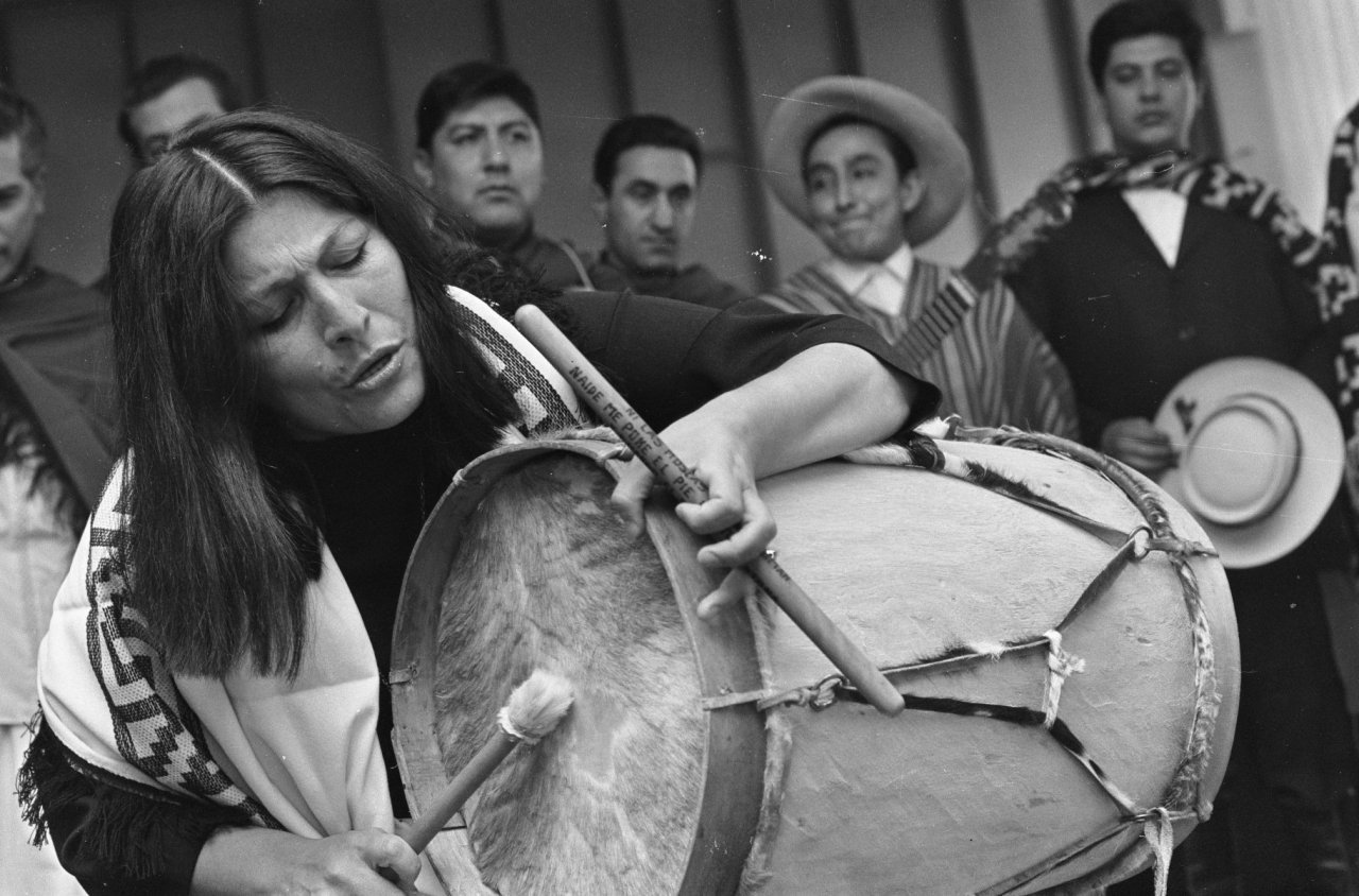 Mercedes Sosa begeleidt zich zelf op een trommel